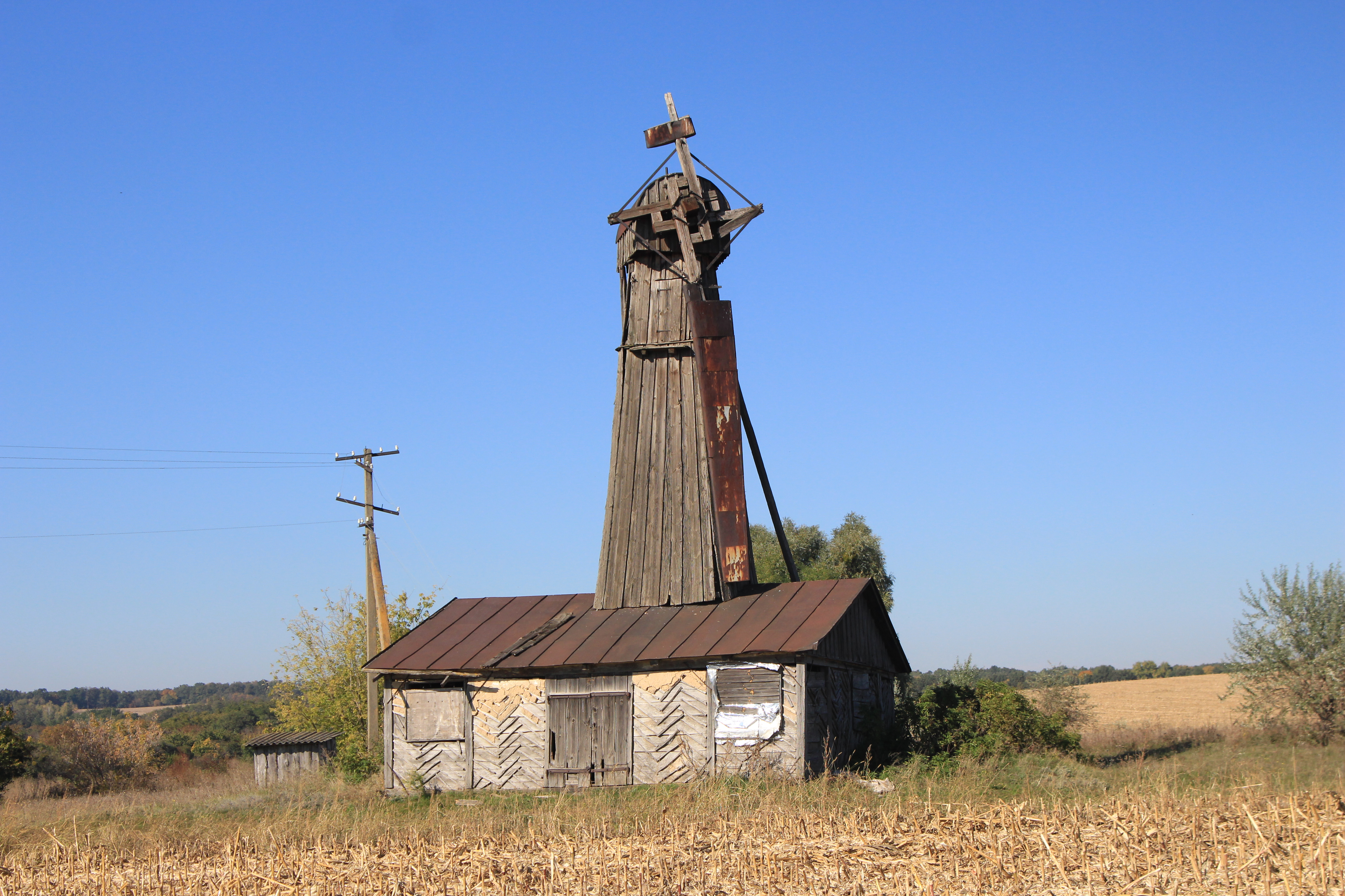 Вітряк (дер.), с. Грищенці